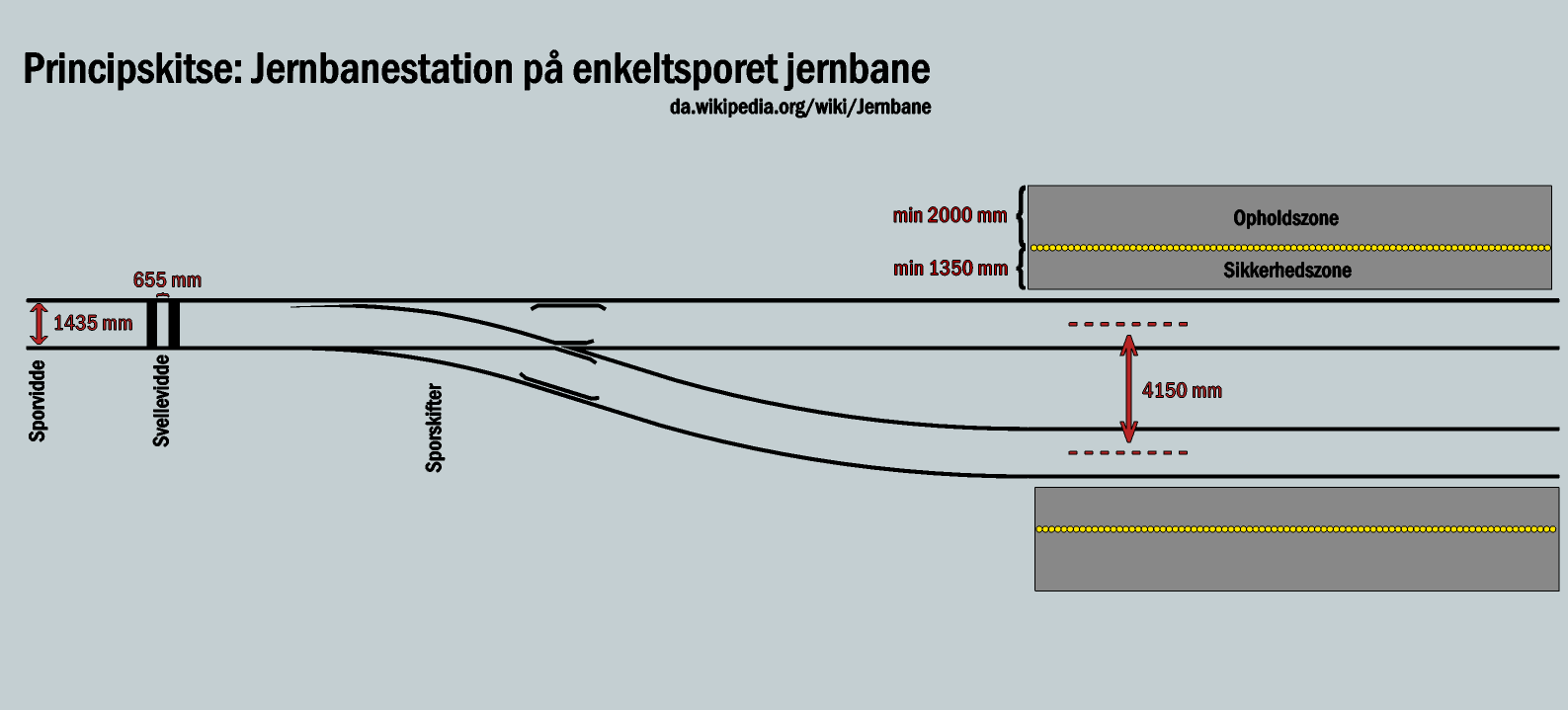 Dette er en principskitse for et jernbanestation på en enkeltsporet jernbane.